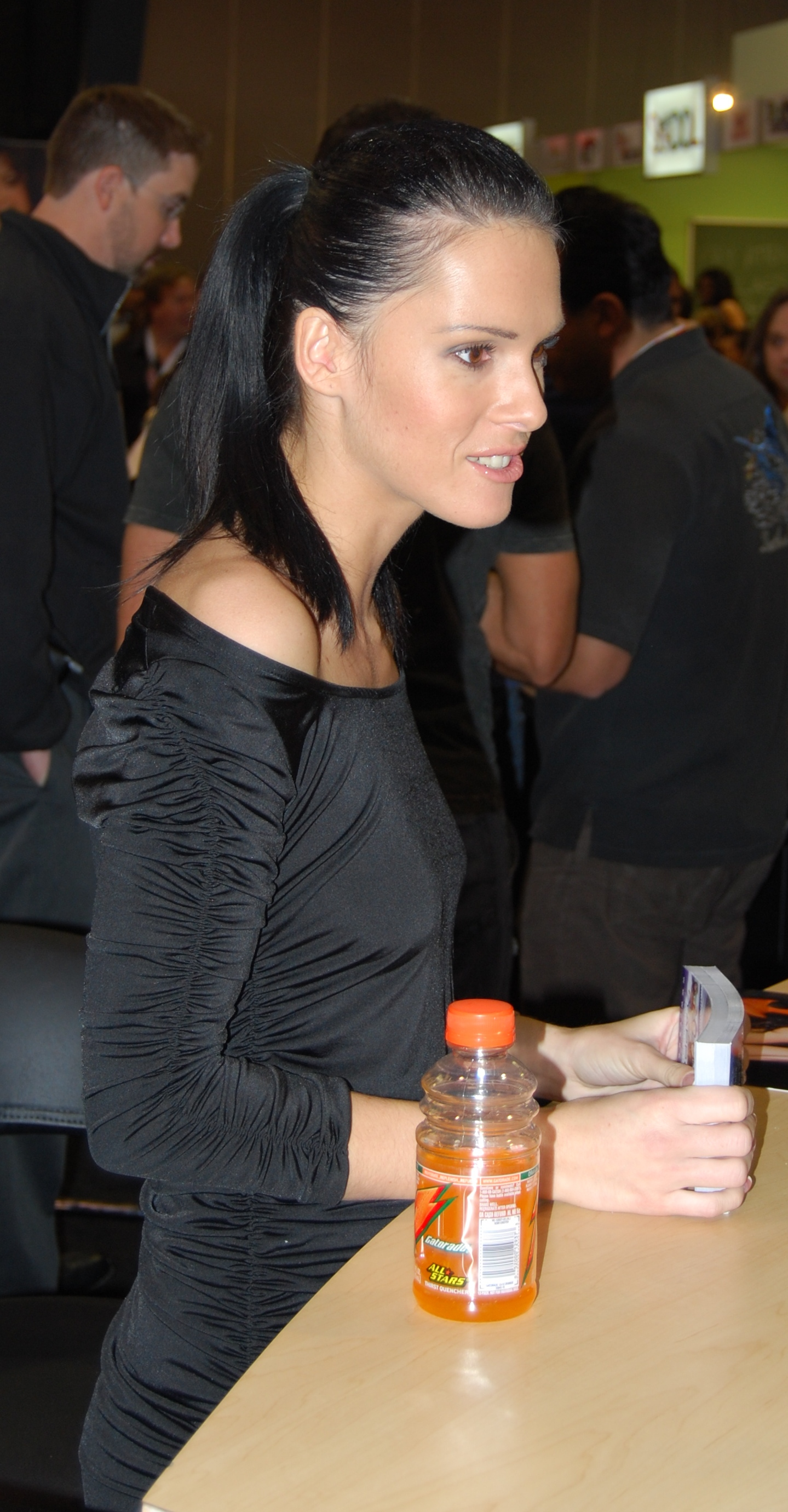 Jennifer Dark in 2008.